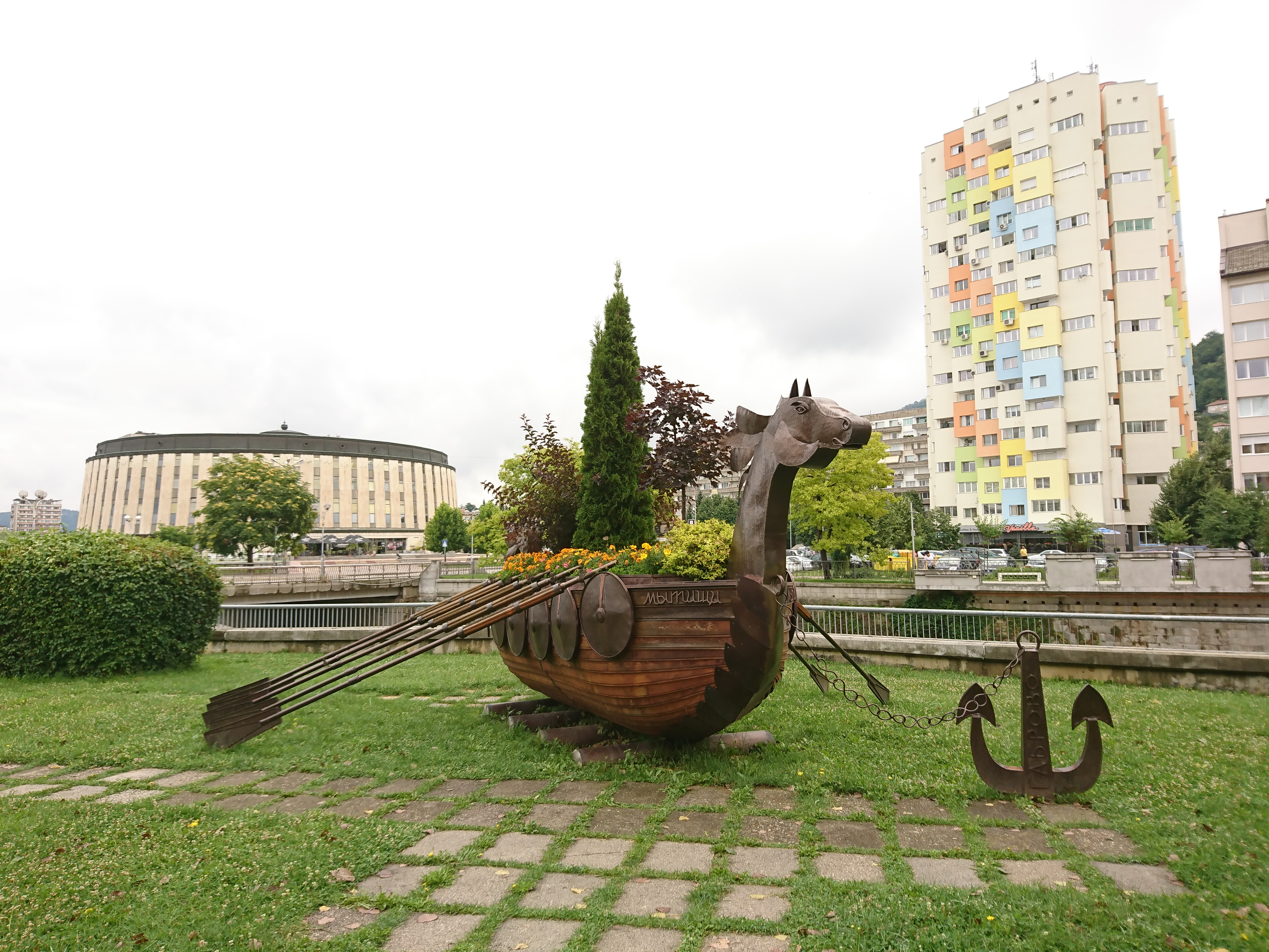 Художествена композиция на кораб с цветя от Митишчи (Русия) в побратимения град Габрово, в България.